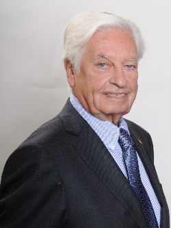 Eduardo Antonio Cerda García